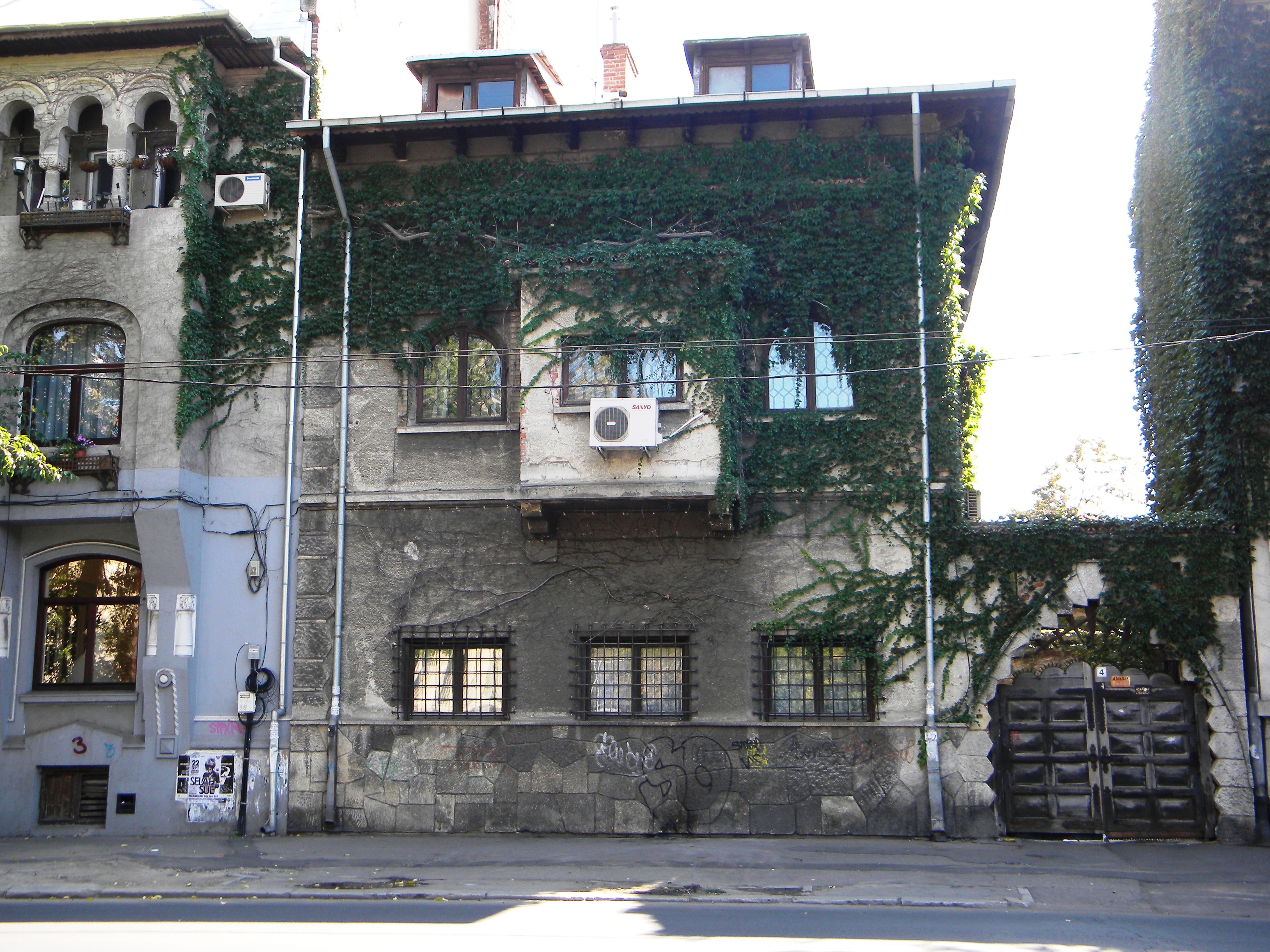 Imobil pe Bd. Pache Protopopescu nr. 4, Bucuresti sect. 2